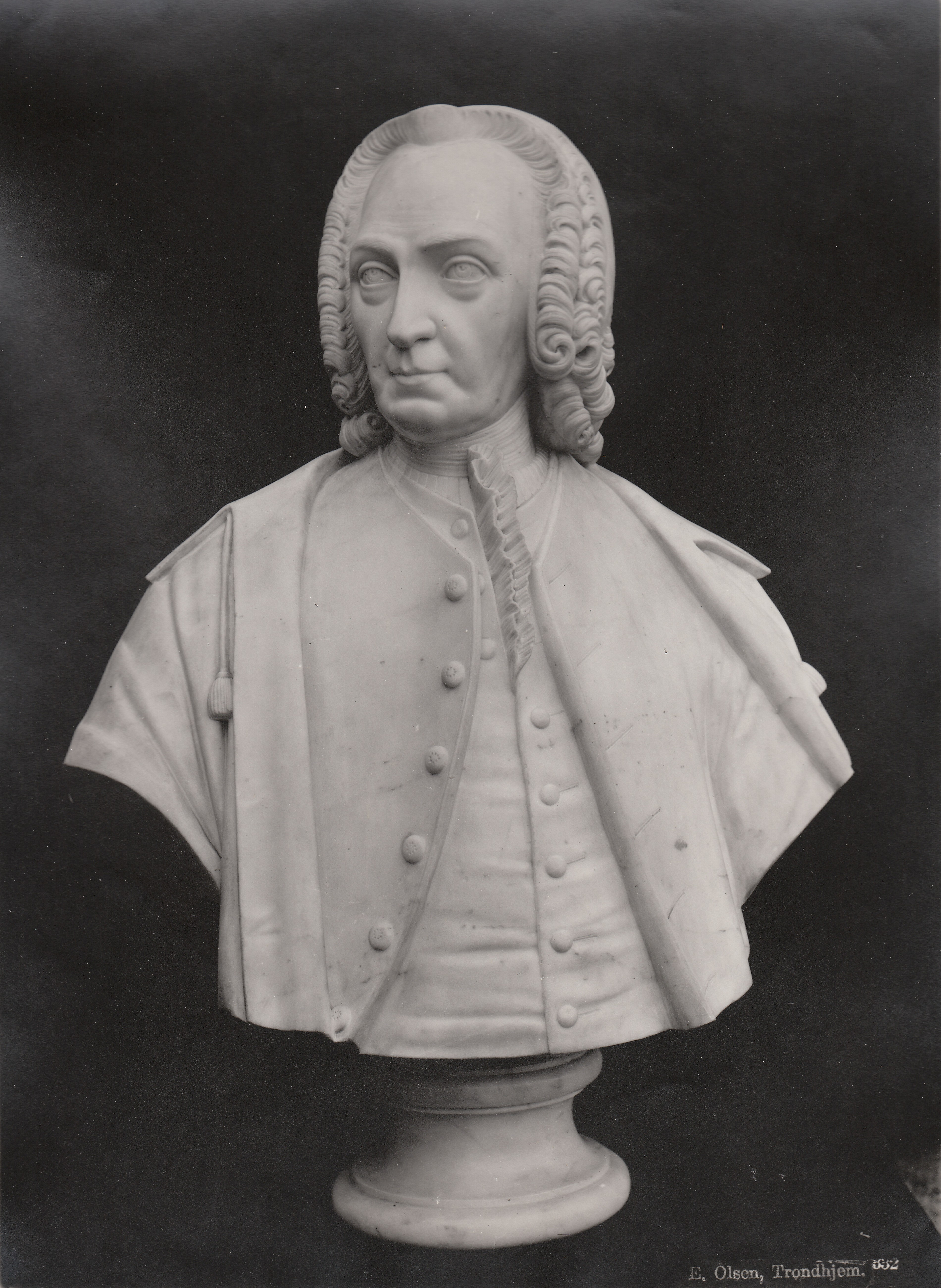 Format: Fotopositiv. Fotograf: Erik Olsen (1835 - 1920). År: 1897. Utstillingstekst i Trondhjems 900 Aars Jubilæum: Katalog for Den Historiske Udstilling i Trondhjem 1897: Angell, Thomas, f 29/12 1692, d. 19/9 1767, Søn af No.729; Kjøbmand i Trondhjem, Stifter af de store Legater, der bærer hans Navn. 733. OM., Brystbill. i fuld Størr. *Thomas Angells Stiftelser. (Et andet Bill., Kopi af dette, malet paa en Kobberplade, findes i Domkirken(se No.291 g.)). 734. Buste i Marmor, sign. paa Bagsiden: H.MICHELSEN [færdig i 1845]. Som Forbillede for denne fortræffelige Buste har det høist maadelige Billede No. 733 tjent. H. 78 cm., uden Fotstykke 63 cm.. Bestilt for en i Trondhjem subskriberet Pengesum og foræret til *Videnskabsselskabet.